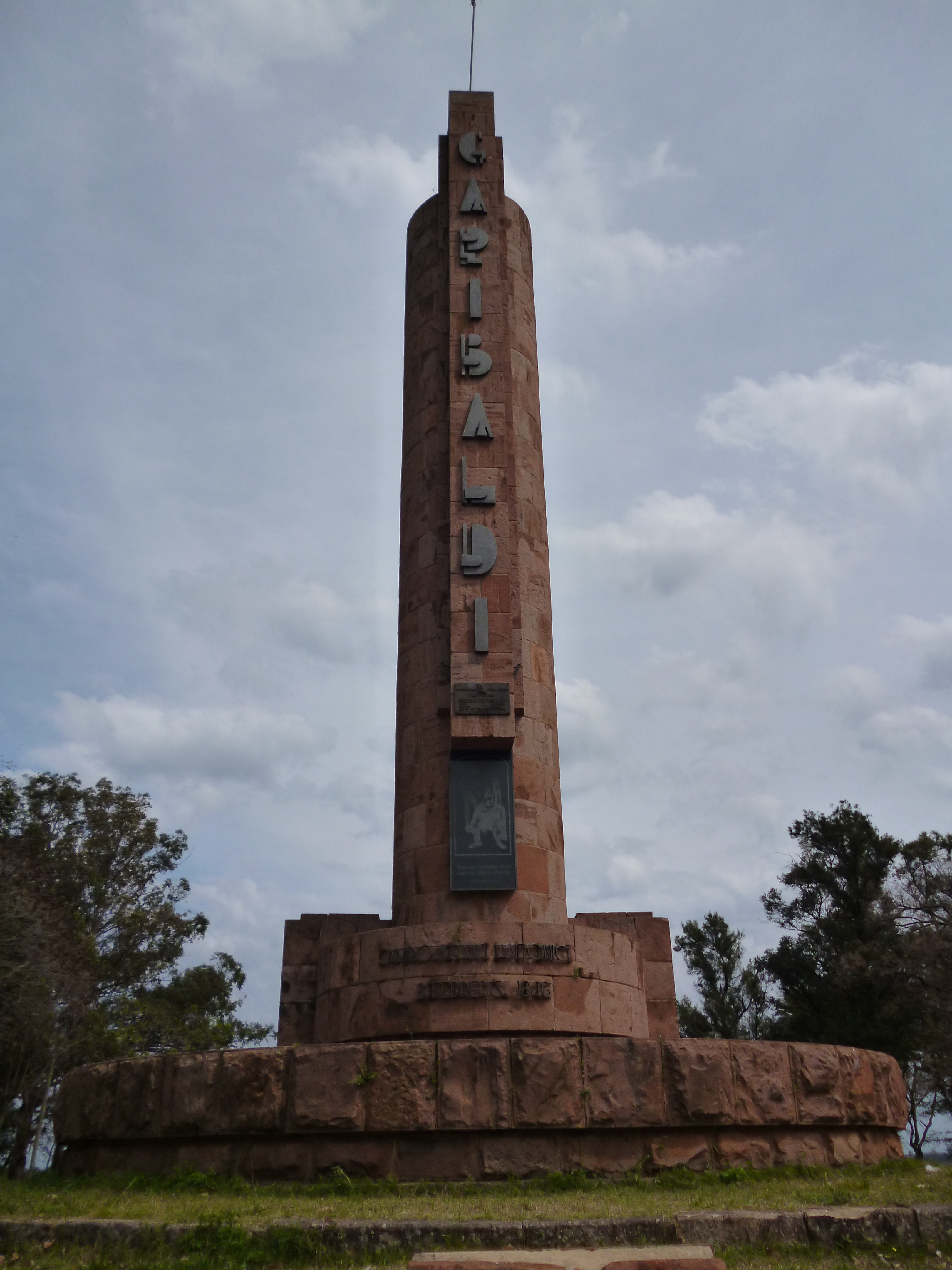 Monumento a José Garibaldi (Salto). Ubicada en el departamento de Salto